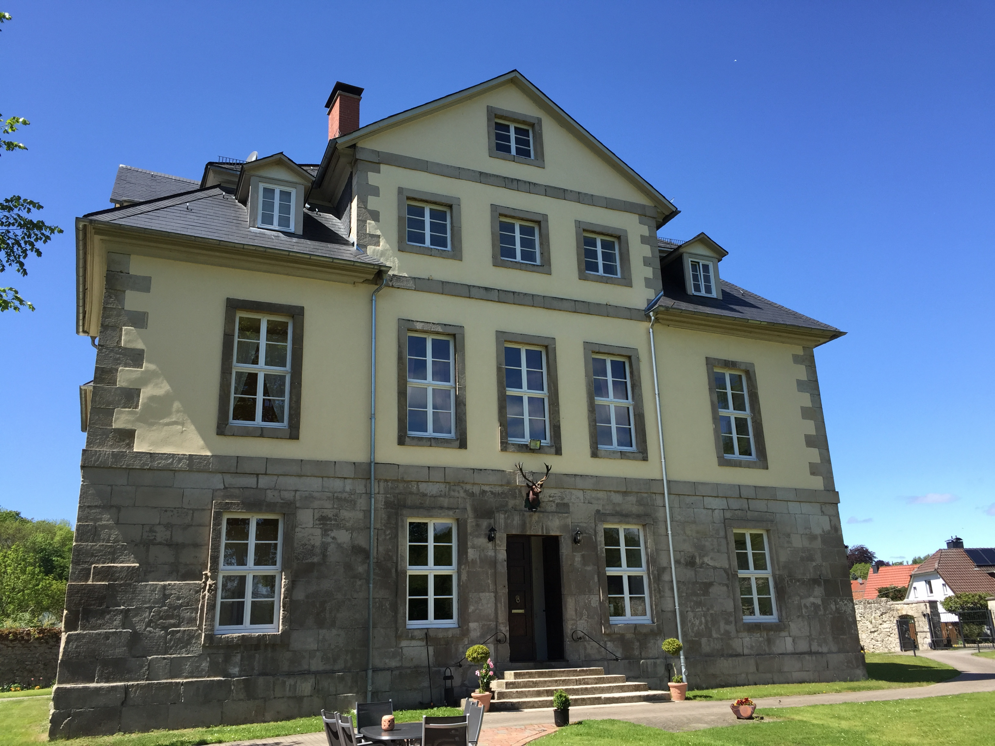 Jagdschloss Walkenried (ehem. Wildenhof)